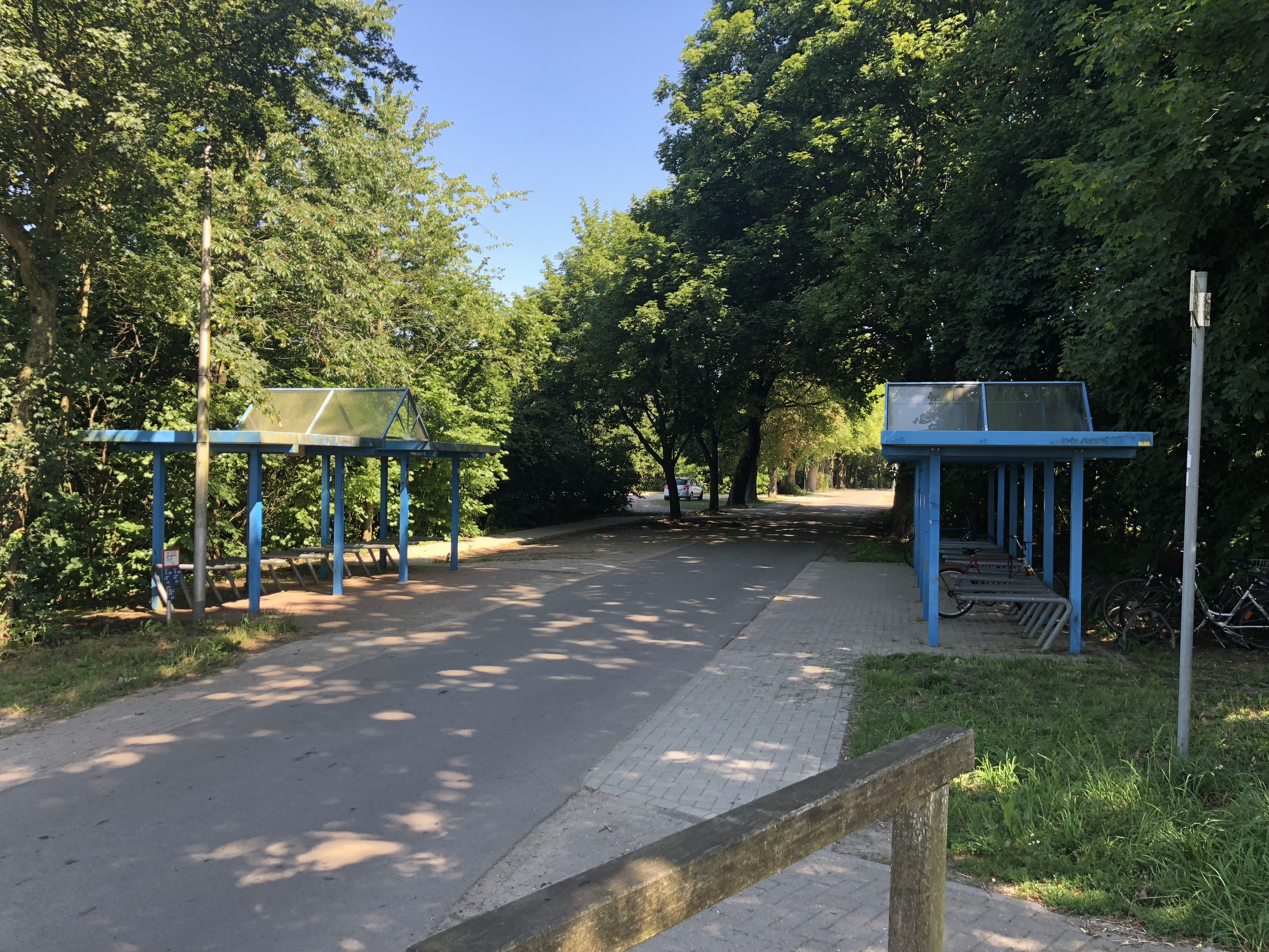 Bahnhoff in Ruschwedel